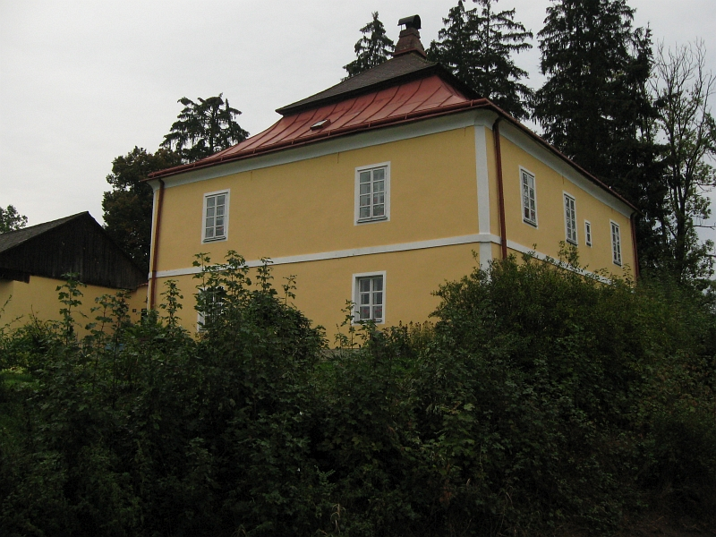 Fara, Mnich 1, Mnich (okres Pelhřimov).